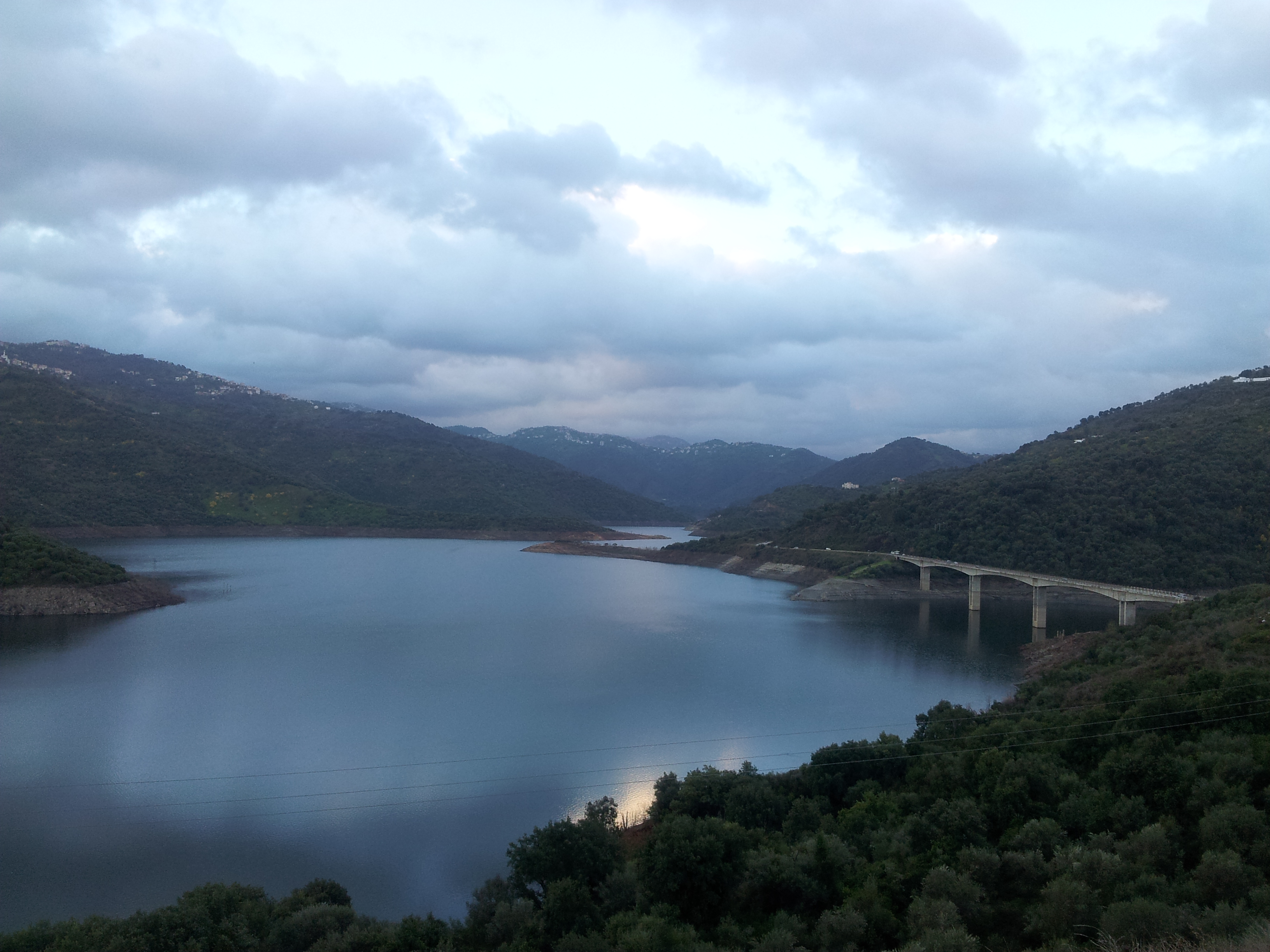 Barrage de Thaksevthe à Oued-Aïssi, commune Les Ouacif.(Kabylie-Algérie)